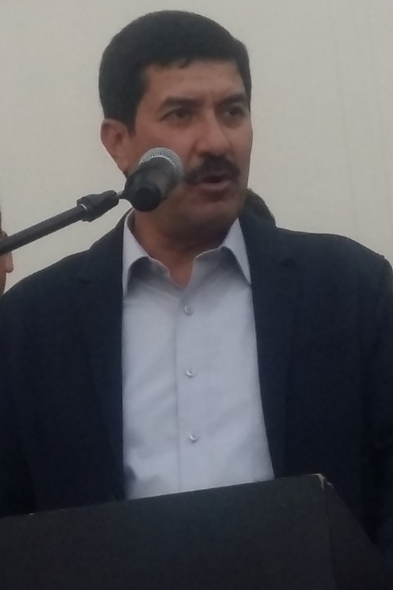 Javier Corral Jurado.